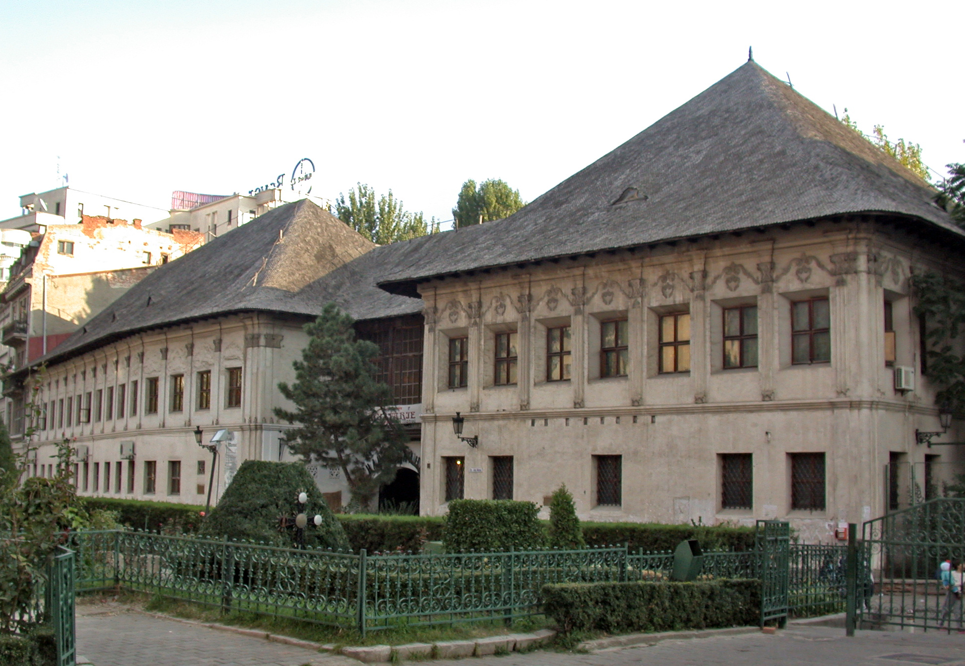 Romania, Bucarest, Ostello Manuc (esterno)